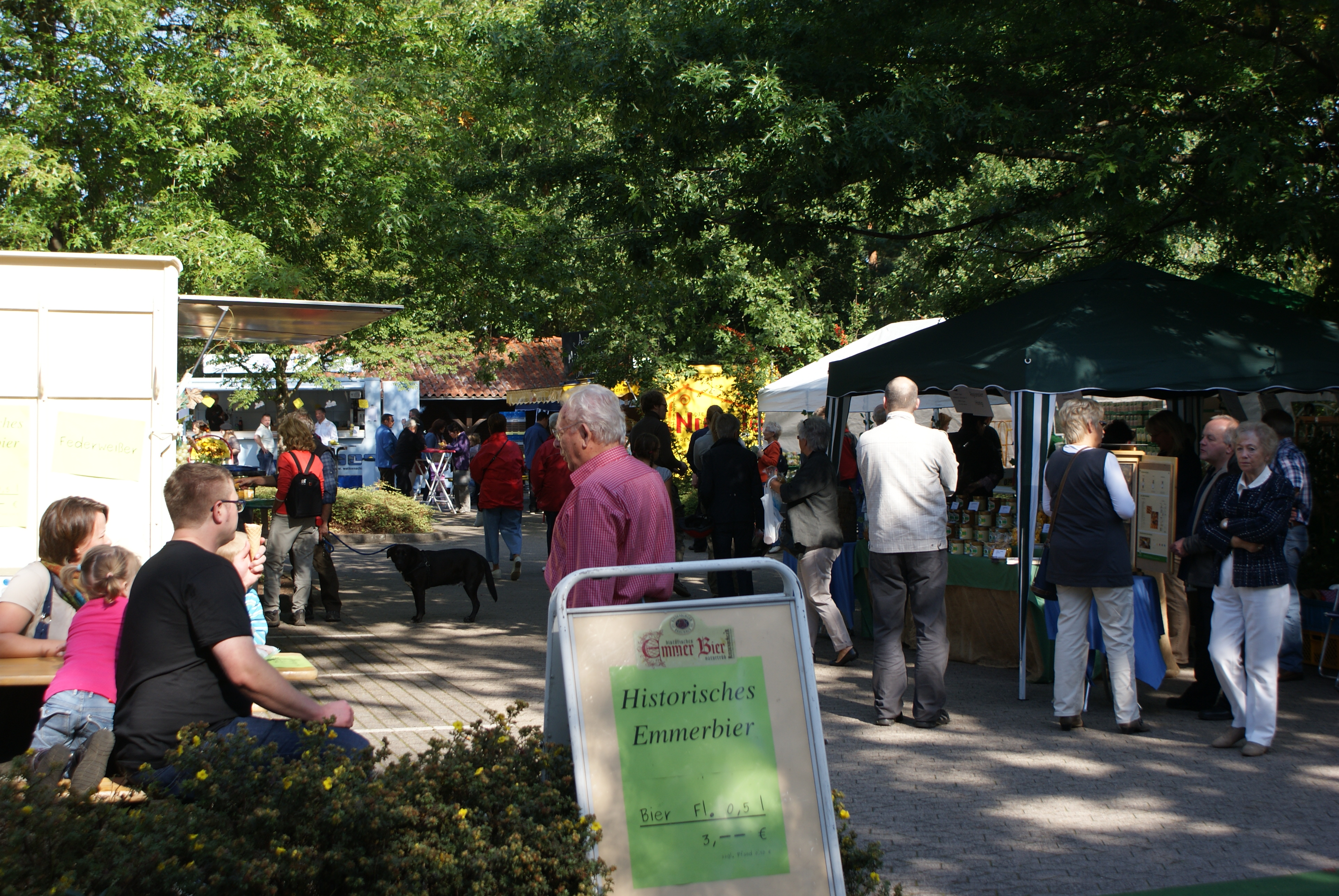 Blick über den Köper Markt 2012 in Oyten